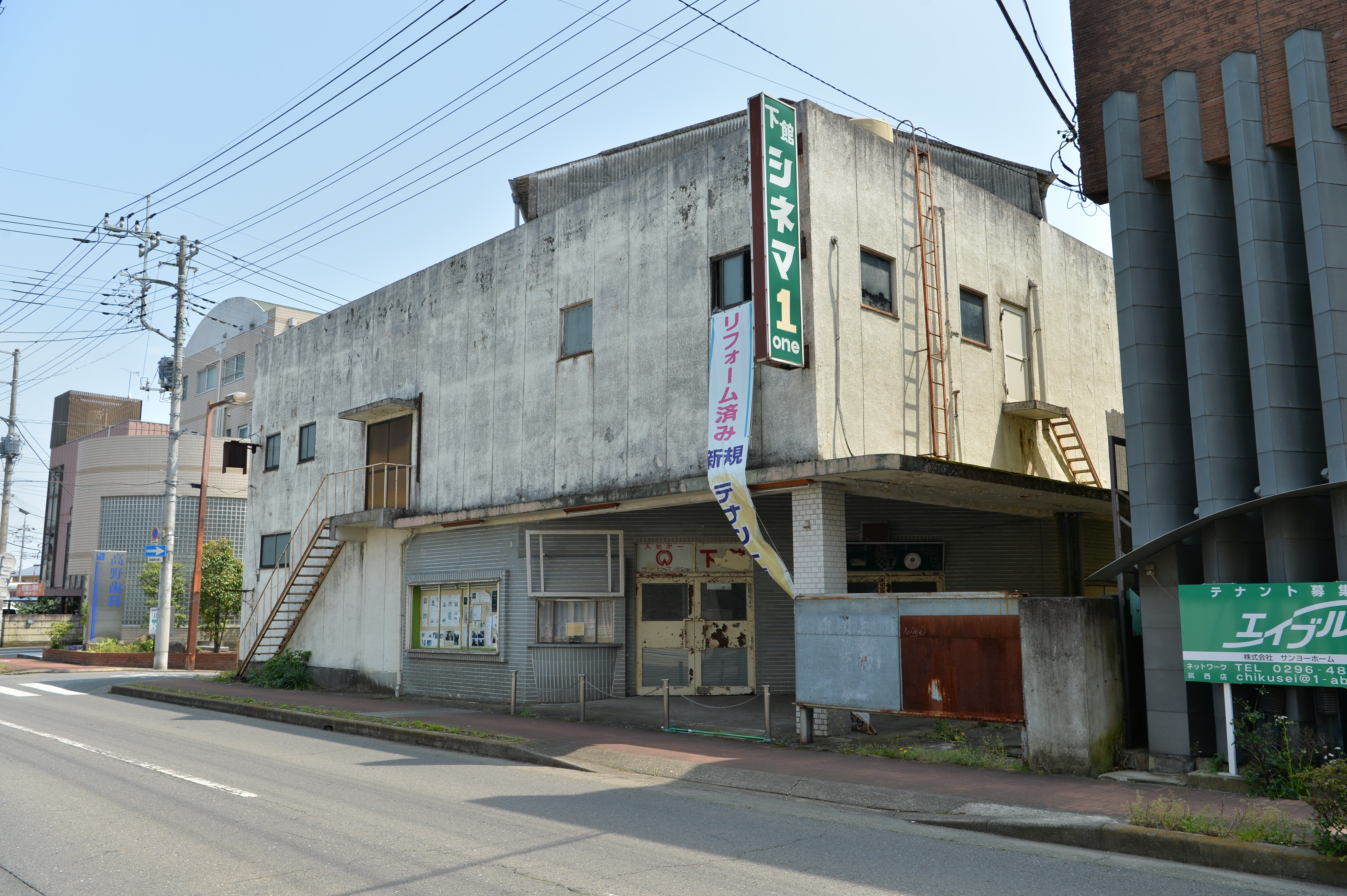 下館シネマ1（旧称：下館第一劇場）の映画館跡（茨城県筑西市柄）